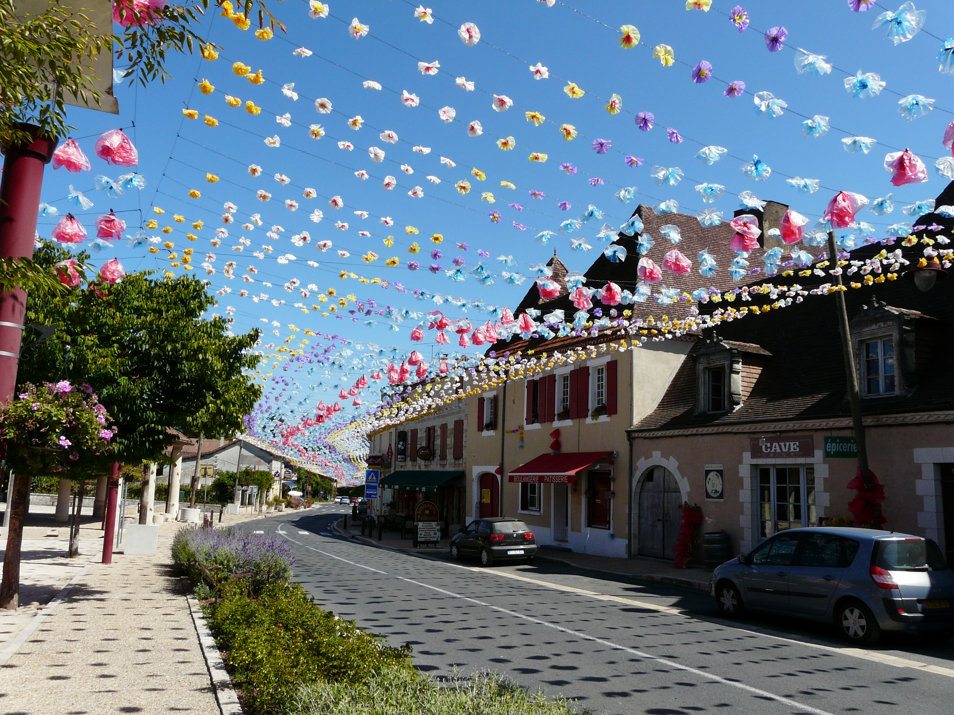 Le bourg de La Douze pavoisé pour la félibrée 2015, Dordogne, France.